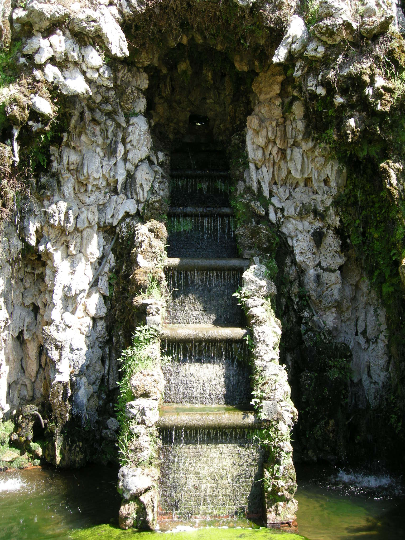 Grotto — Villa Reale di Marlia.